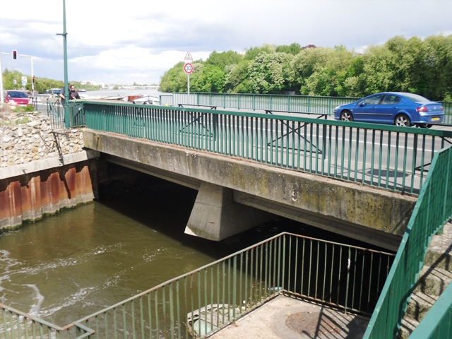 L'Orge à Athis-Mons (91)